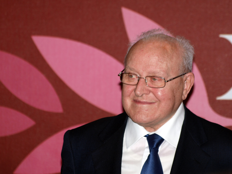 Ettore Bernabei - Foto di G. M. Ireneo Alessi (Sinix)